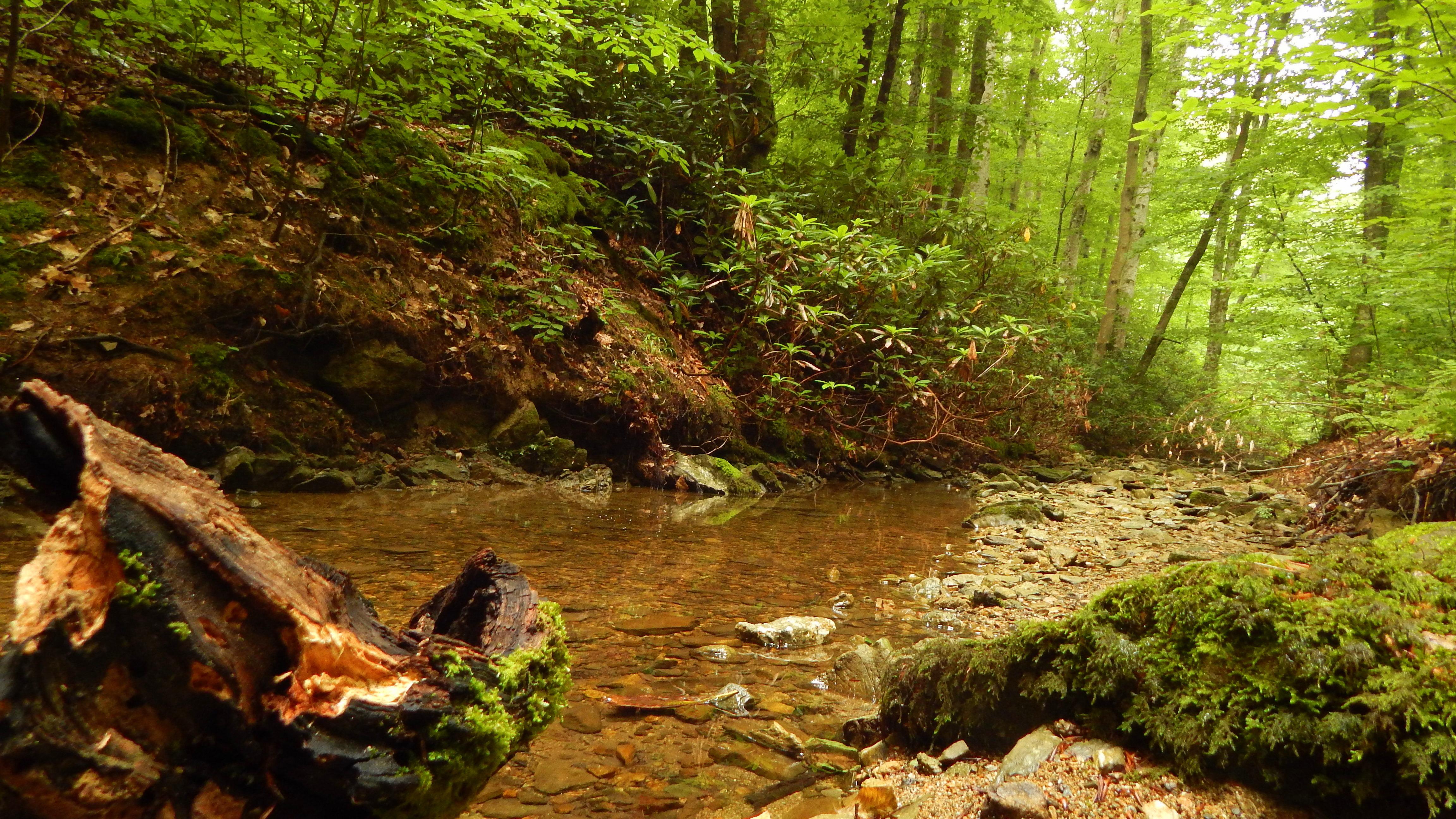 Силкосия